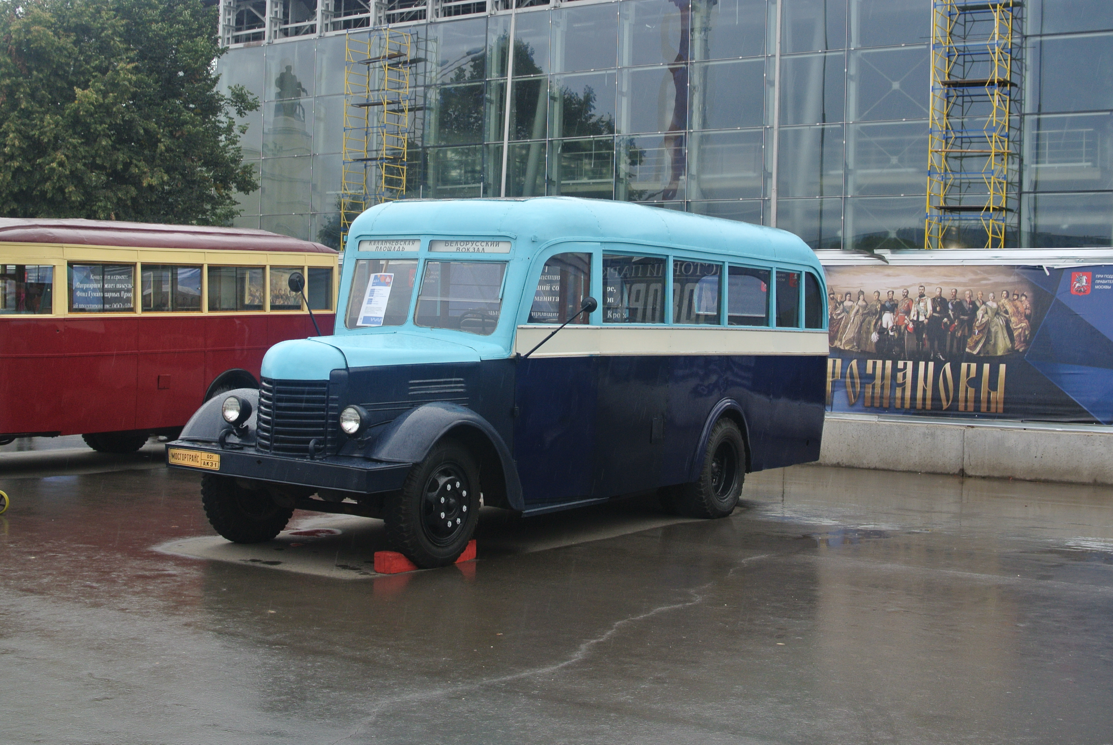 Автобус АКЗ-1 на выставке Мосгортранс на ВВЦ